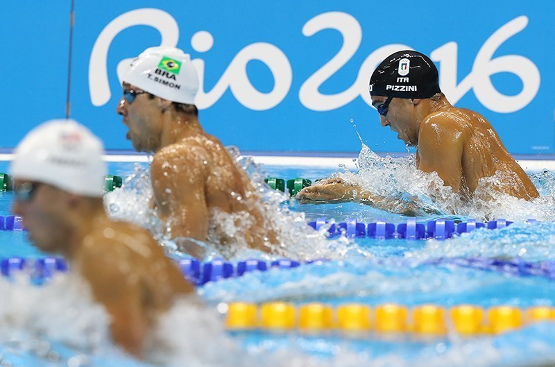 Swimming at the 2016 Summer Olympics – Men's 200 metre breaststroke